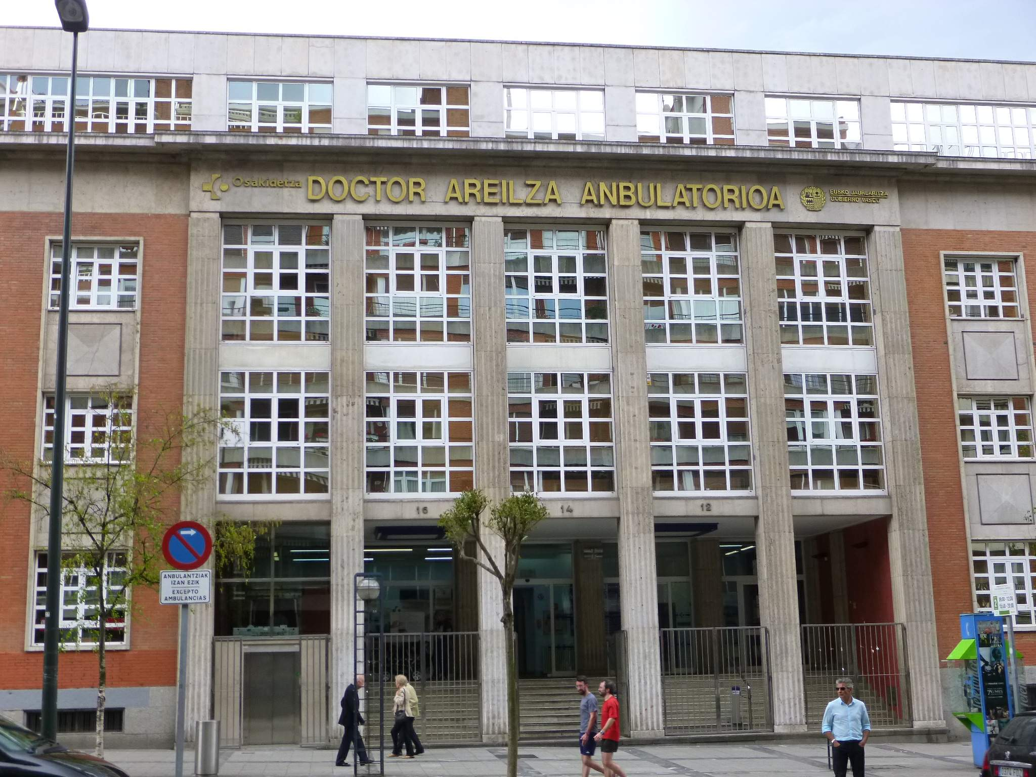 Ambulatorio Doctor Areilza (Bilbao)